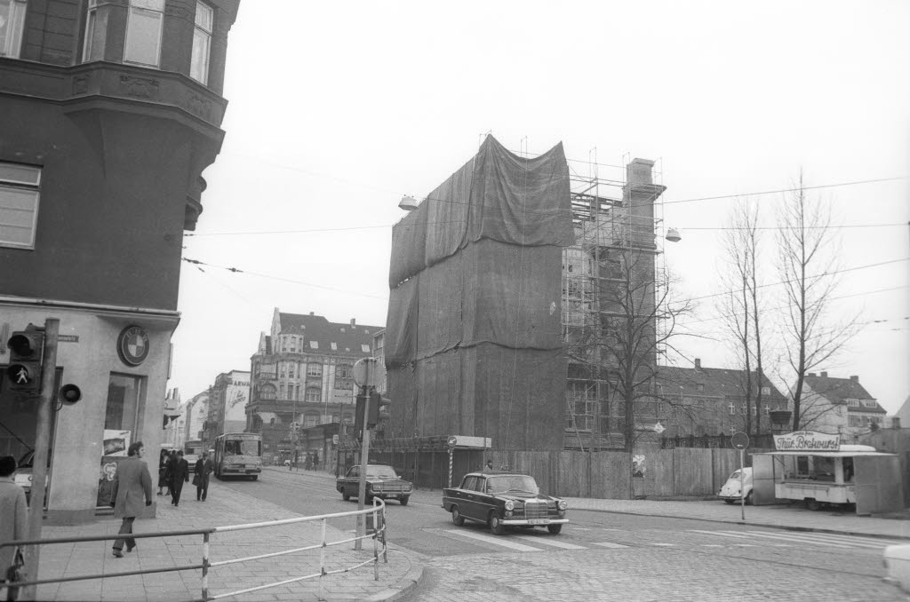 Blickrichtung Hauptbahnhof.